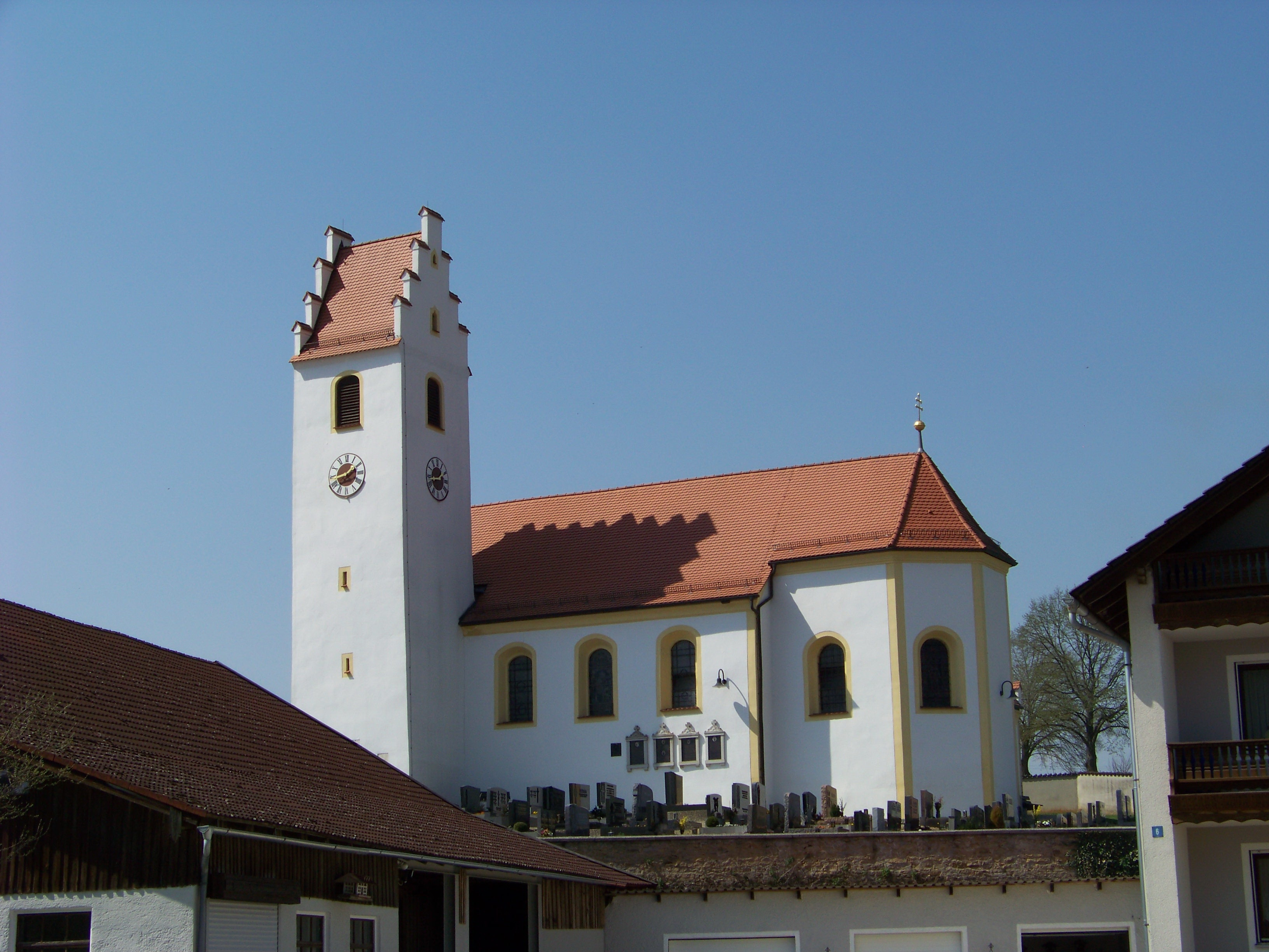 Thalmassing, Untersanding Dorfstraße 10. Katholische Filialkirche St. Pankratius, Saalbau mit eingezogenem Chor, Flankenturm mit Treppengiebel, spätes 17. Jahrhundert, im Kern älter, Turm gotisch, Ende 14. Jahrhundert; mit Ausstattung; Friedhofsmauer, Bruchstein, 17./18. Jahrhundert